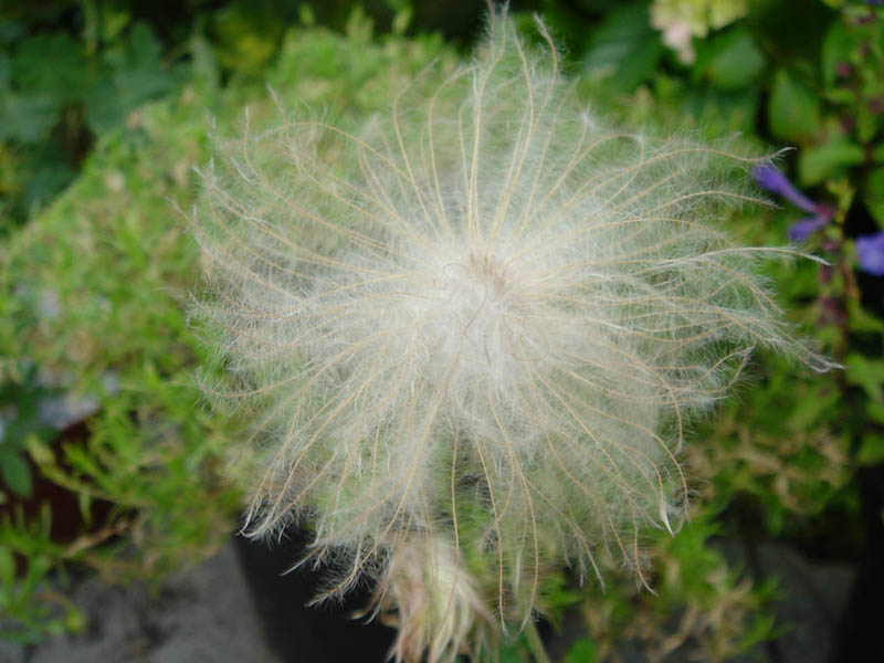 Dryas x suendermanii